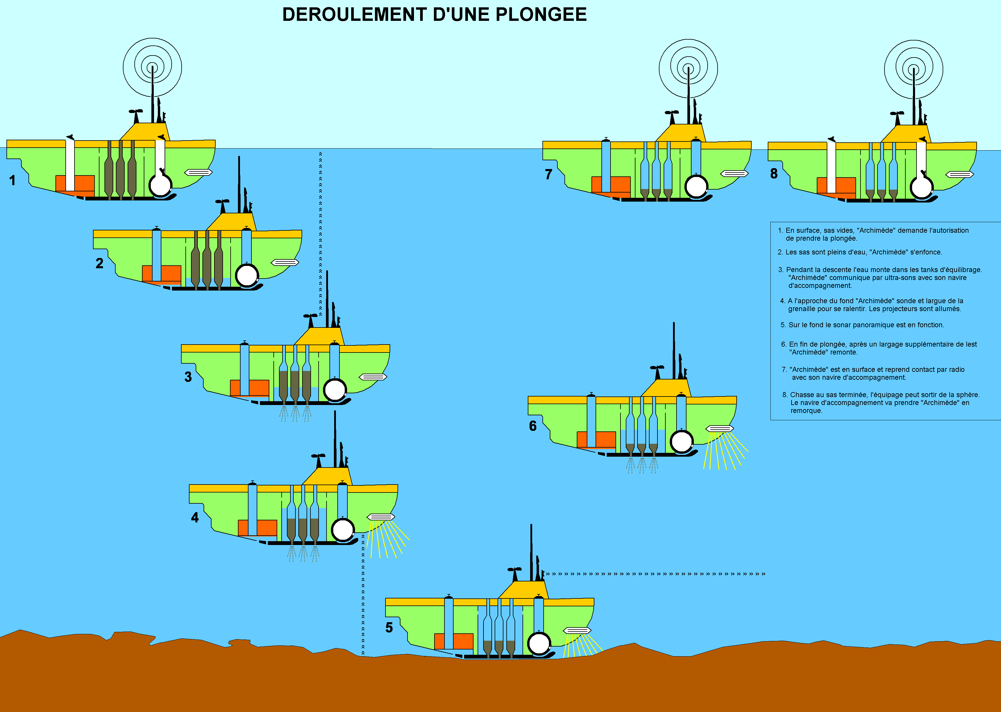 Le déroulement d'une plongée de l'Archimède